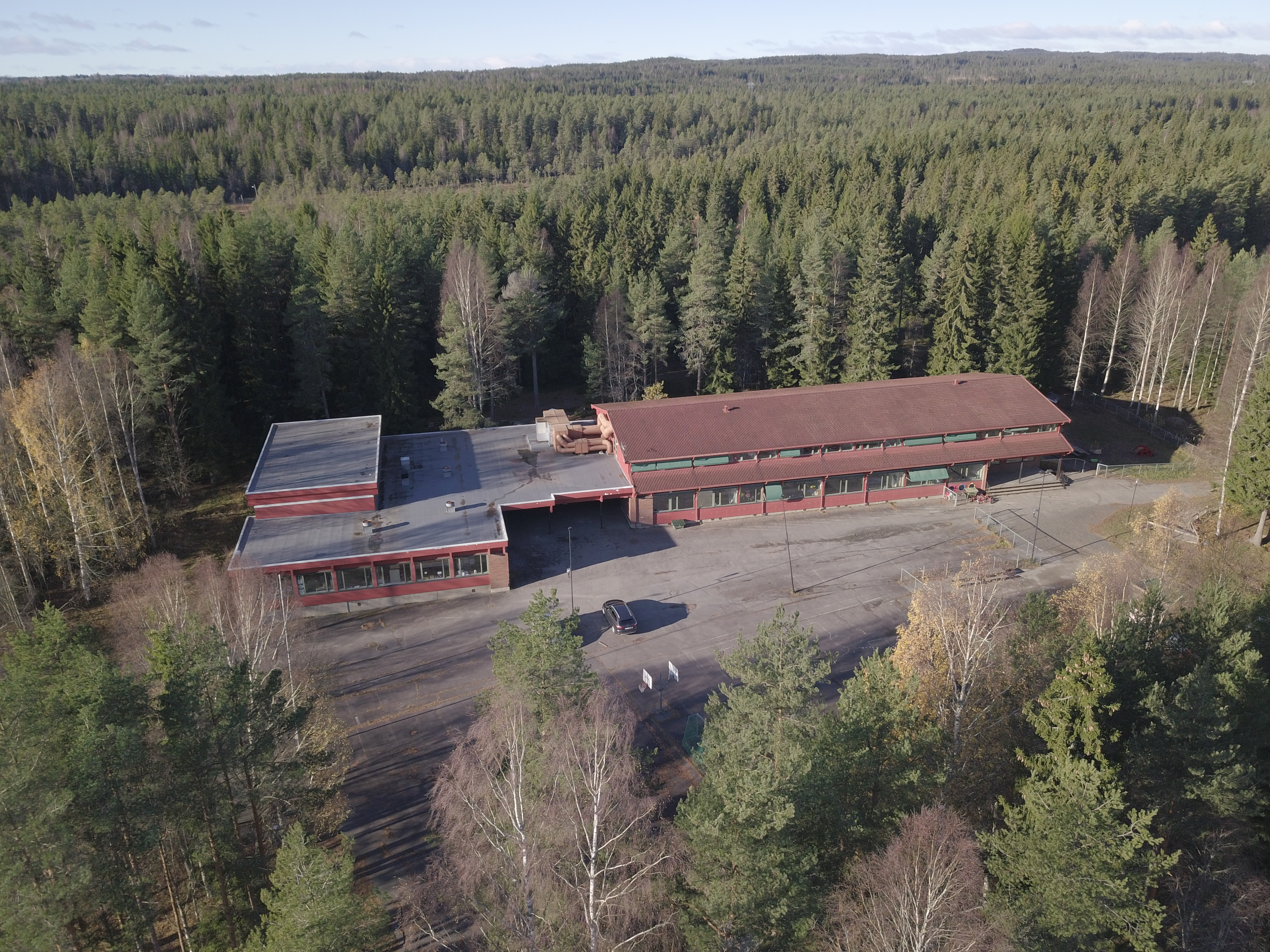 Brårud skole på Brårud i Nes